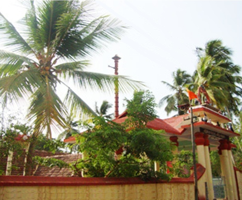 അമരവിള രാമേശ്വരം മഹാദേവക്ഷേത്രം